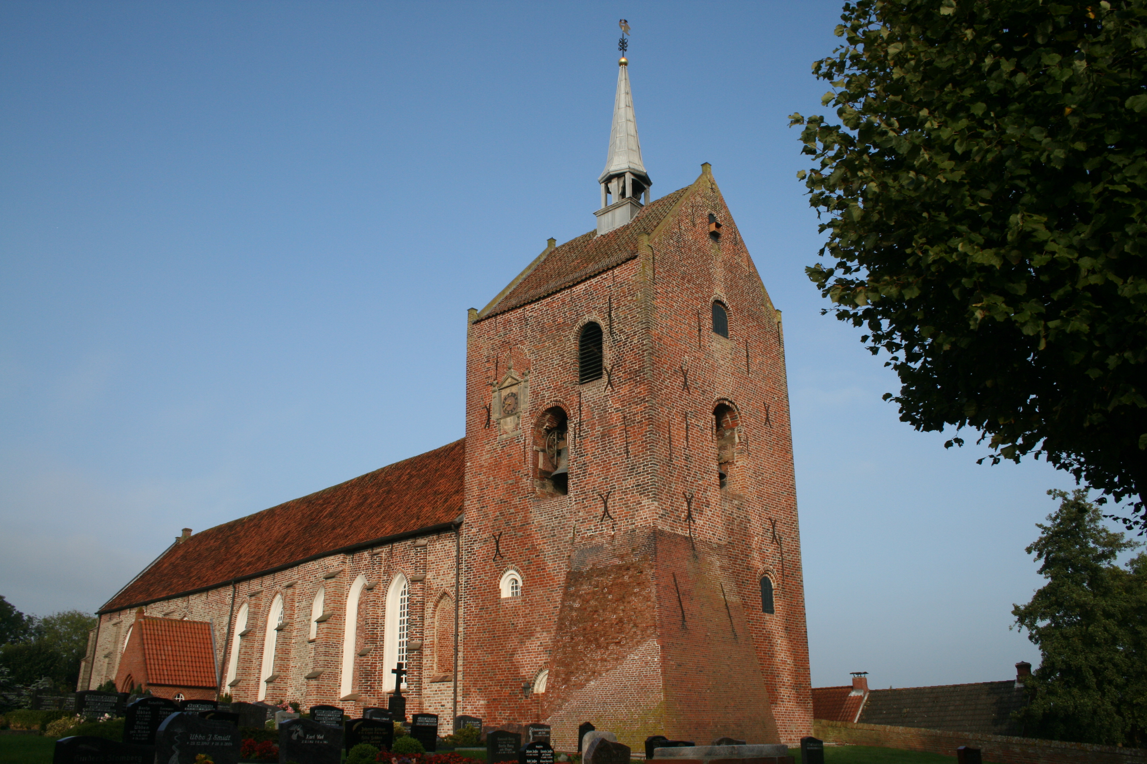 Groothusener Kirche, einst St. Petrus-Kirche